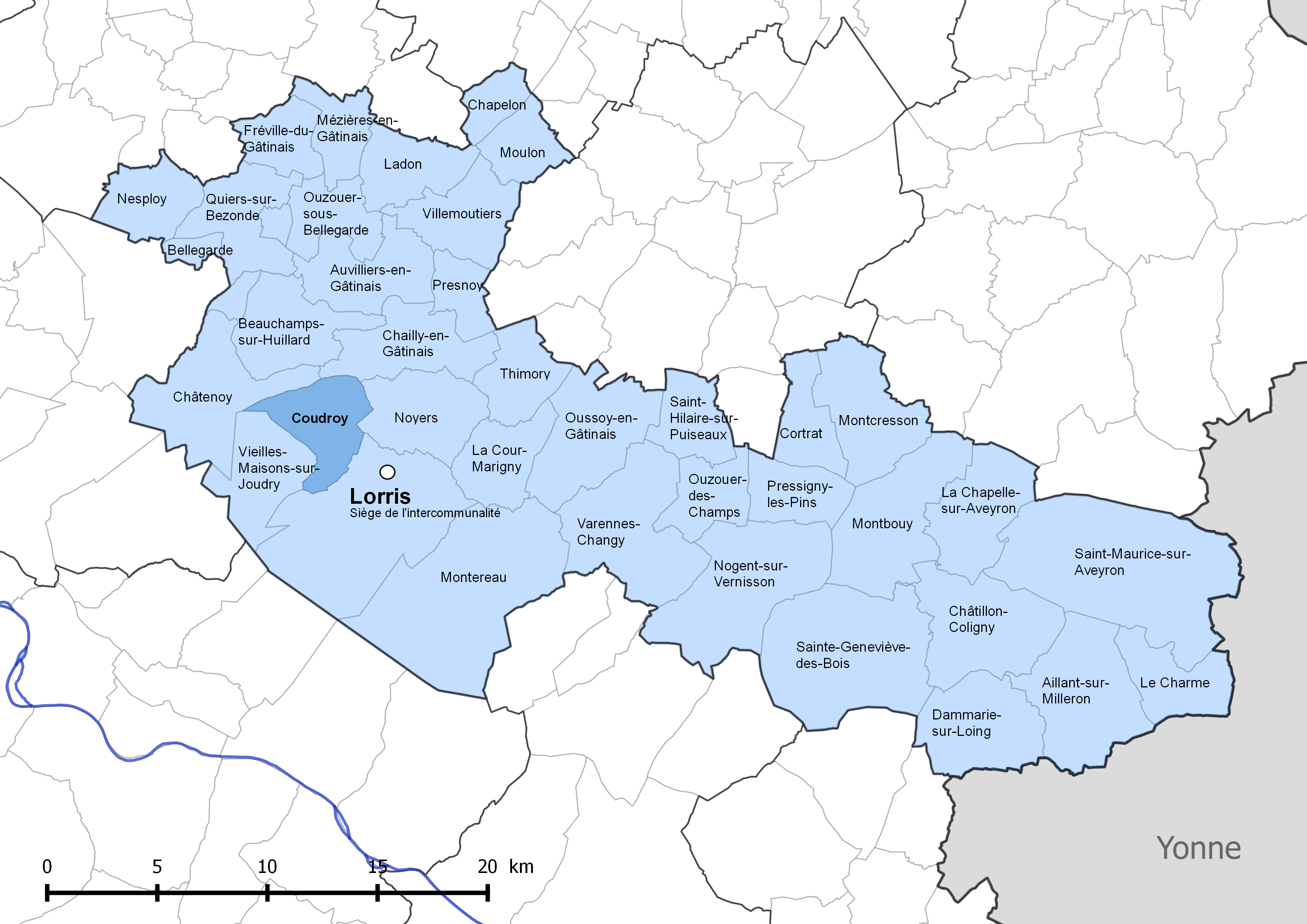 Périmètre de la communauté de communes Canaux et forêts en Gâtinais - Situation de la commune de Coudroy.